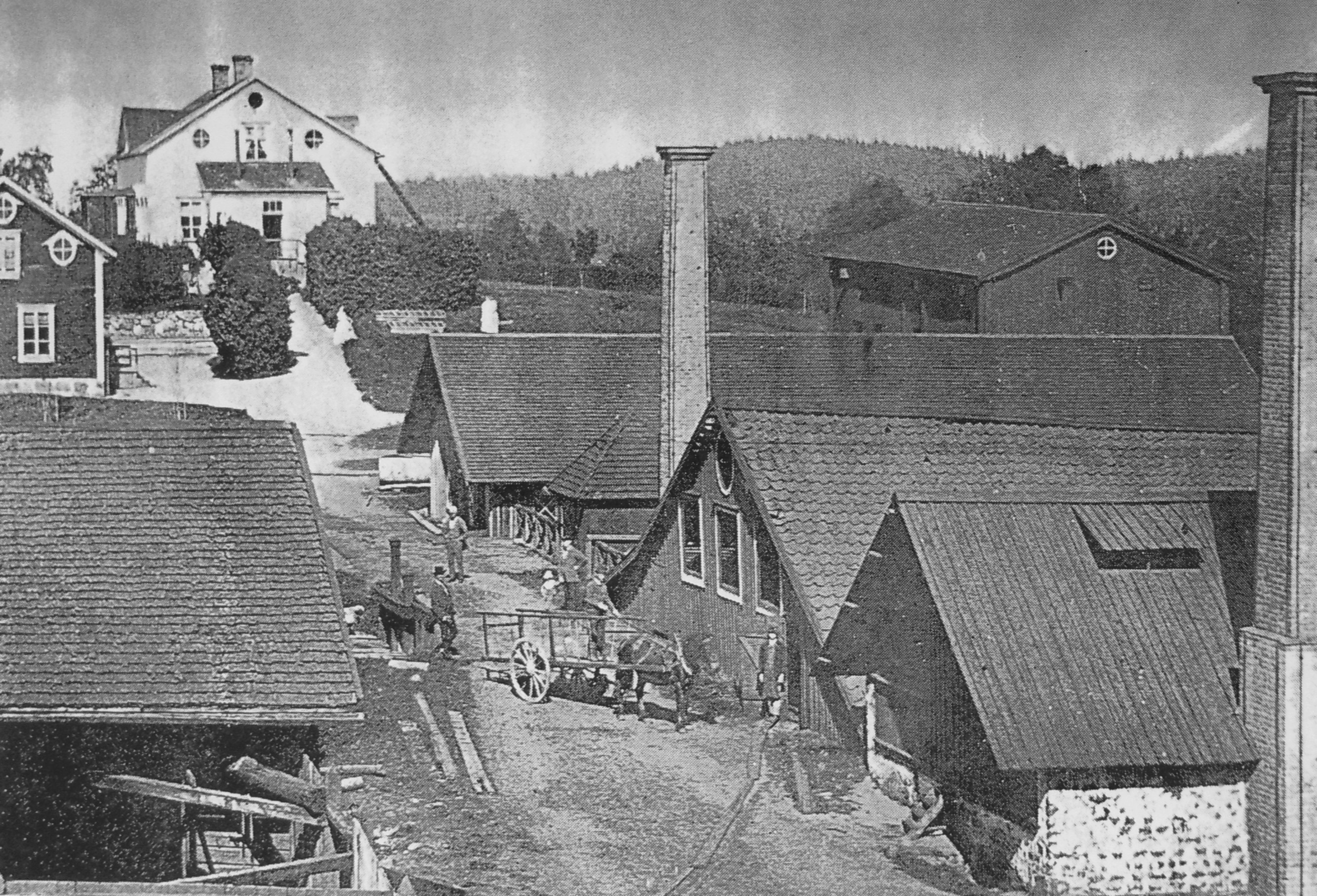 Lindesnäs bruk med herrgården i bakgrunden